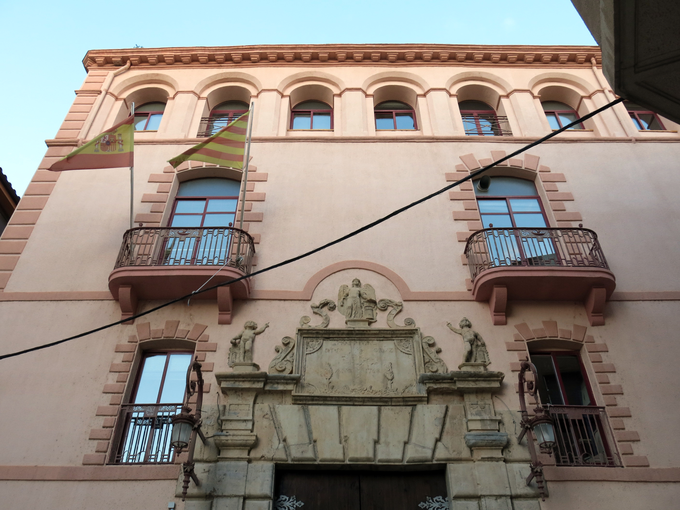 Jutjats (Tortosa)